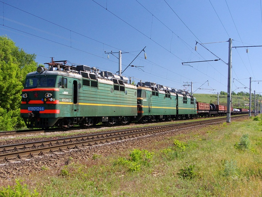 Электровоз ВЛ80С-1244, в составе трёх секций, с поездом